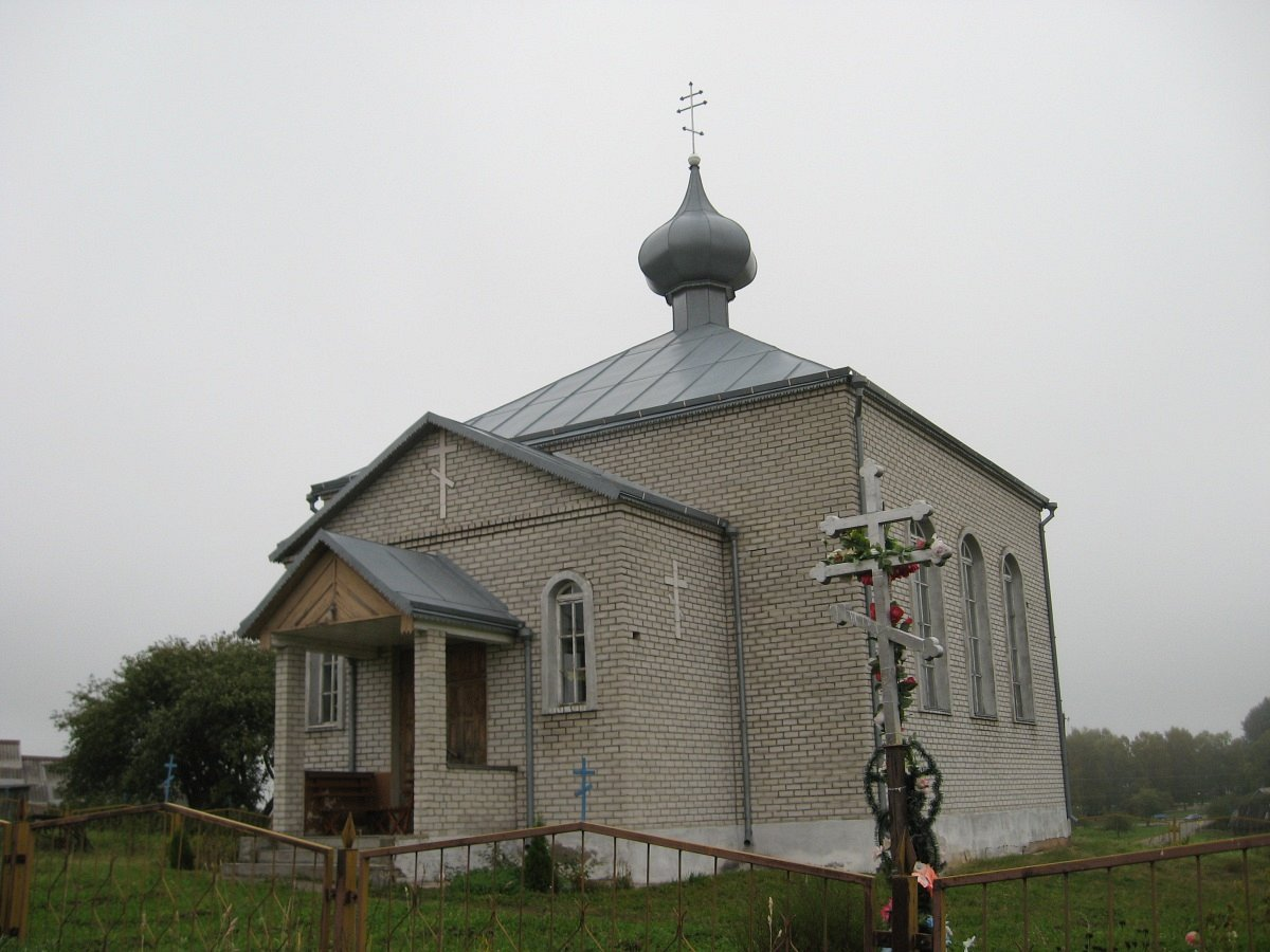 Доры. Царква